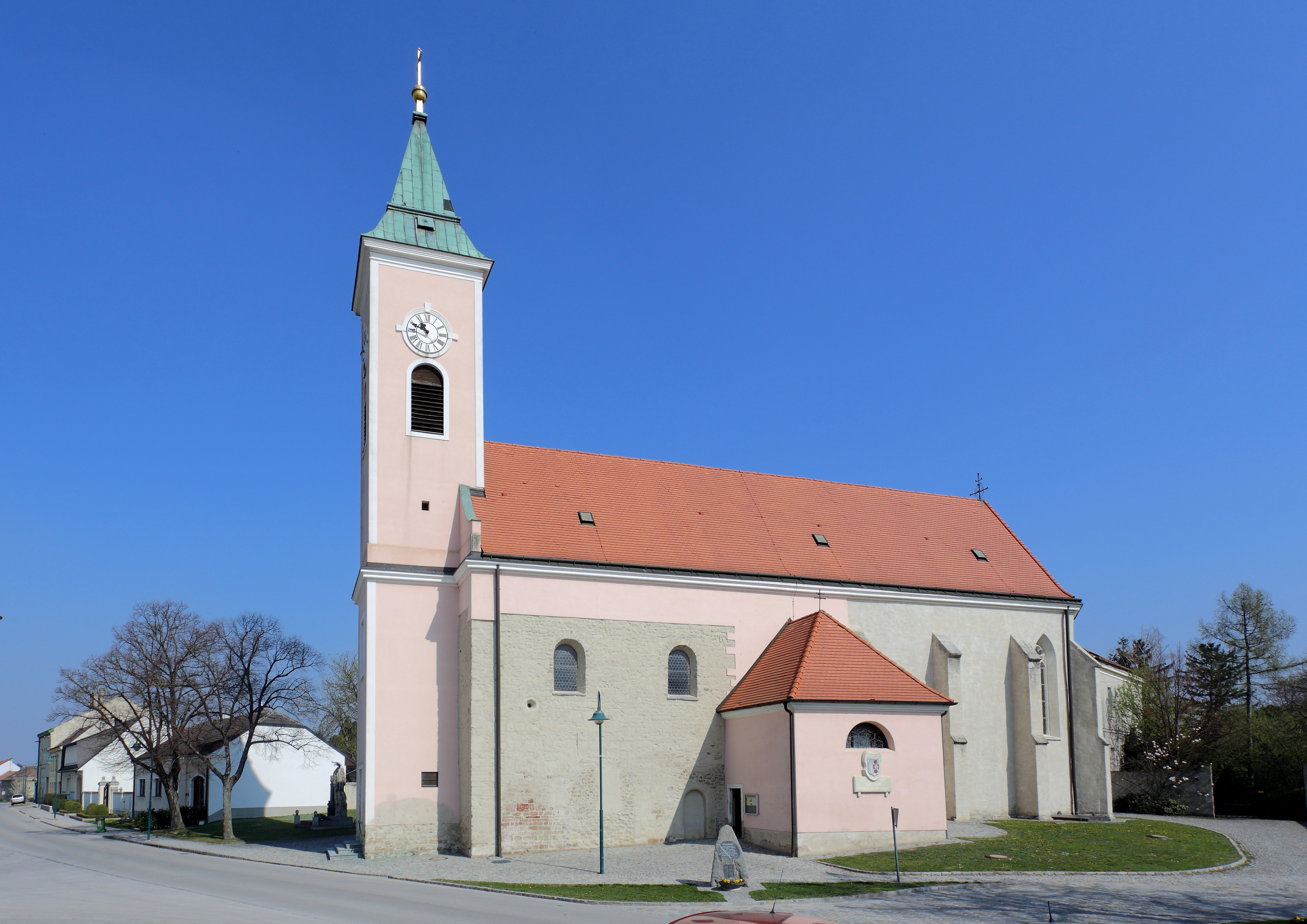 Pfarrkirche hl. Stephan in Probstdorf, ein Ortsteil der niederösterreichischen Stadt Groß-Enzersdorf. Ein Sakralbau, dessen Langhaus in der Kernsubstanz mittelalterlich ist. In der 2. Hälfte des 17. Jahrhunderts wurde der Kirchenbau barockisiert und im Süden sowie im Norden je ein Kapellenanbau errichtet. Der vorgestellte Turm im Westen stammt aus dem Jahr 1802. Der gotische Chor und die Sakristei im Norden sind mit 1418 datiert.